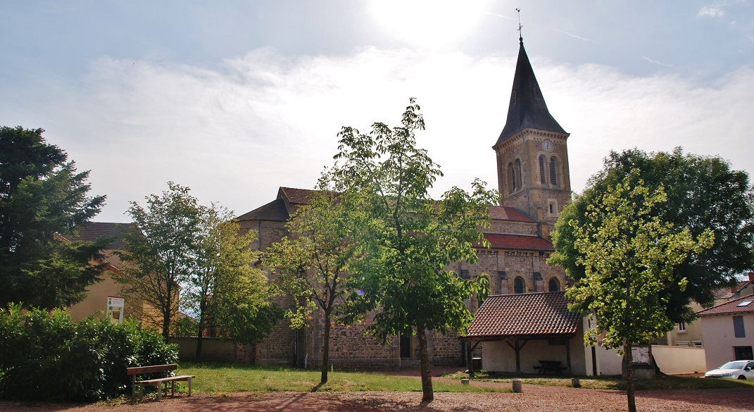 église St Germain